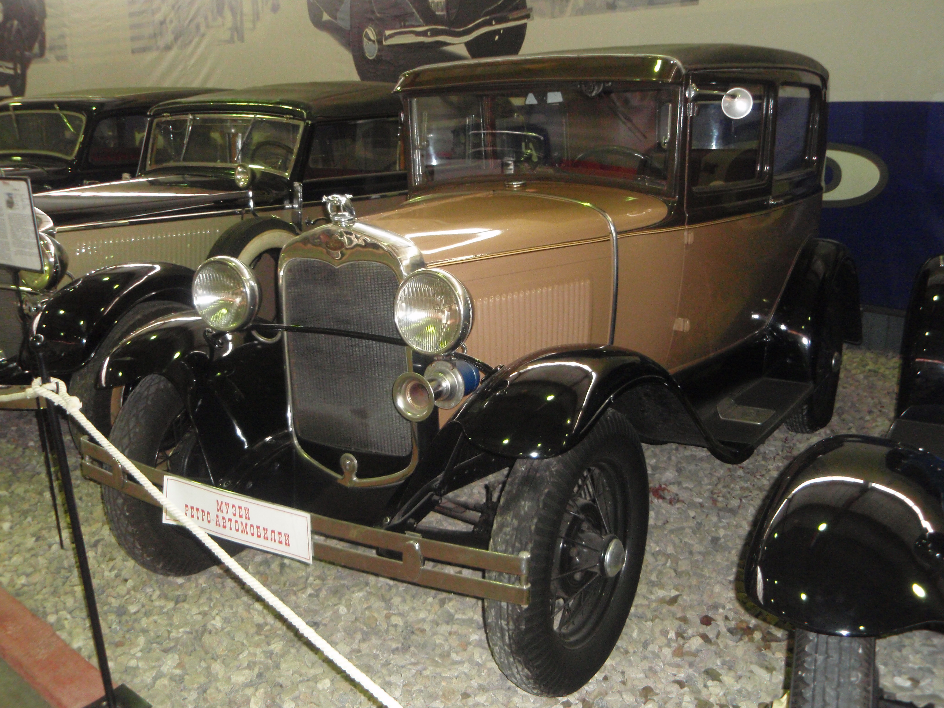 Автомобиль Ford A